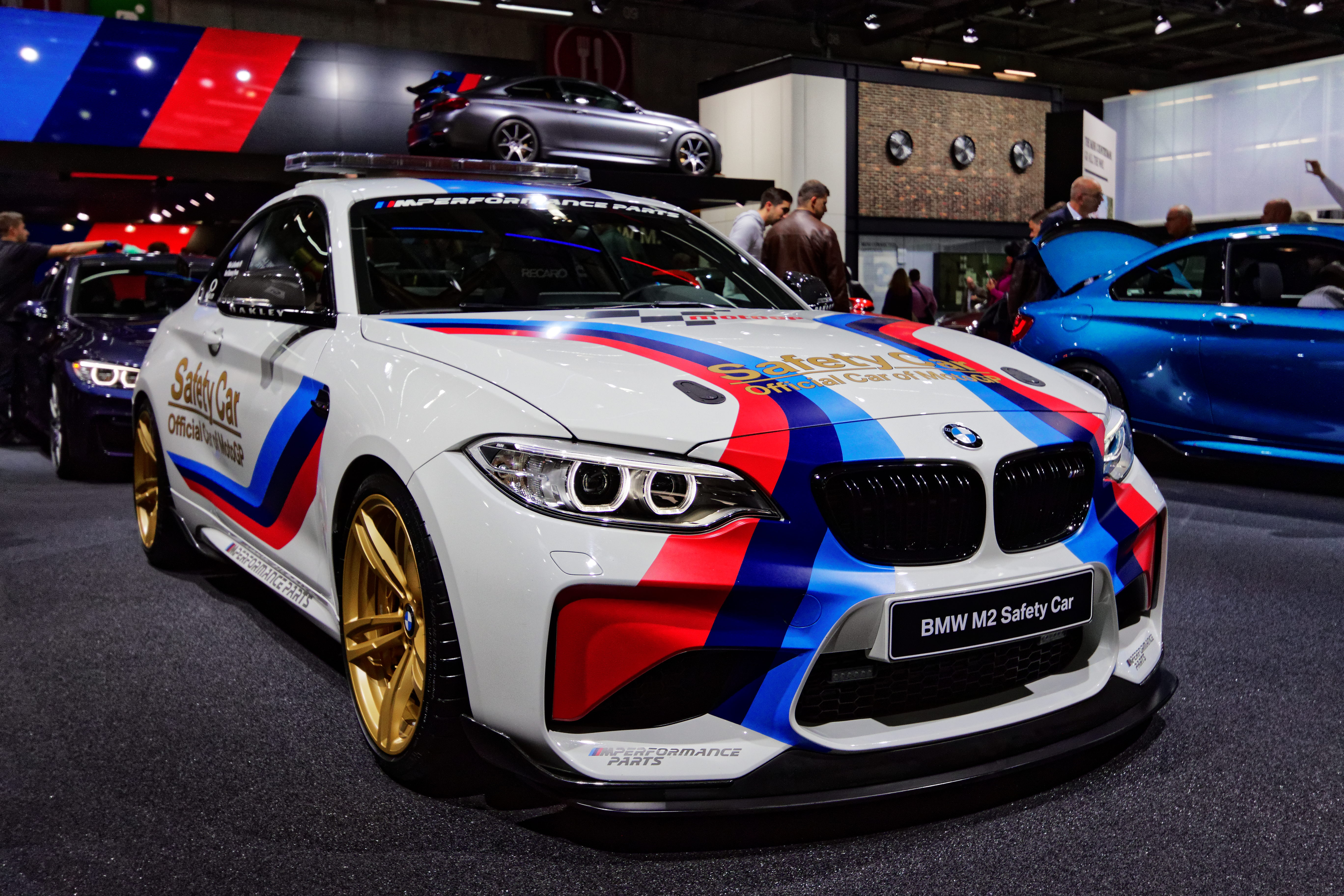 Une BMW M2 Safety car présentée lors du mondial de l'automobile de Paris 2016.